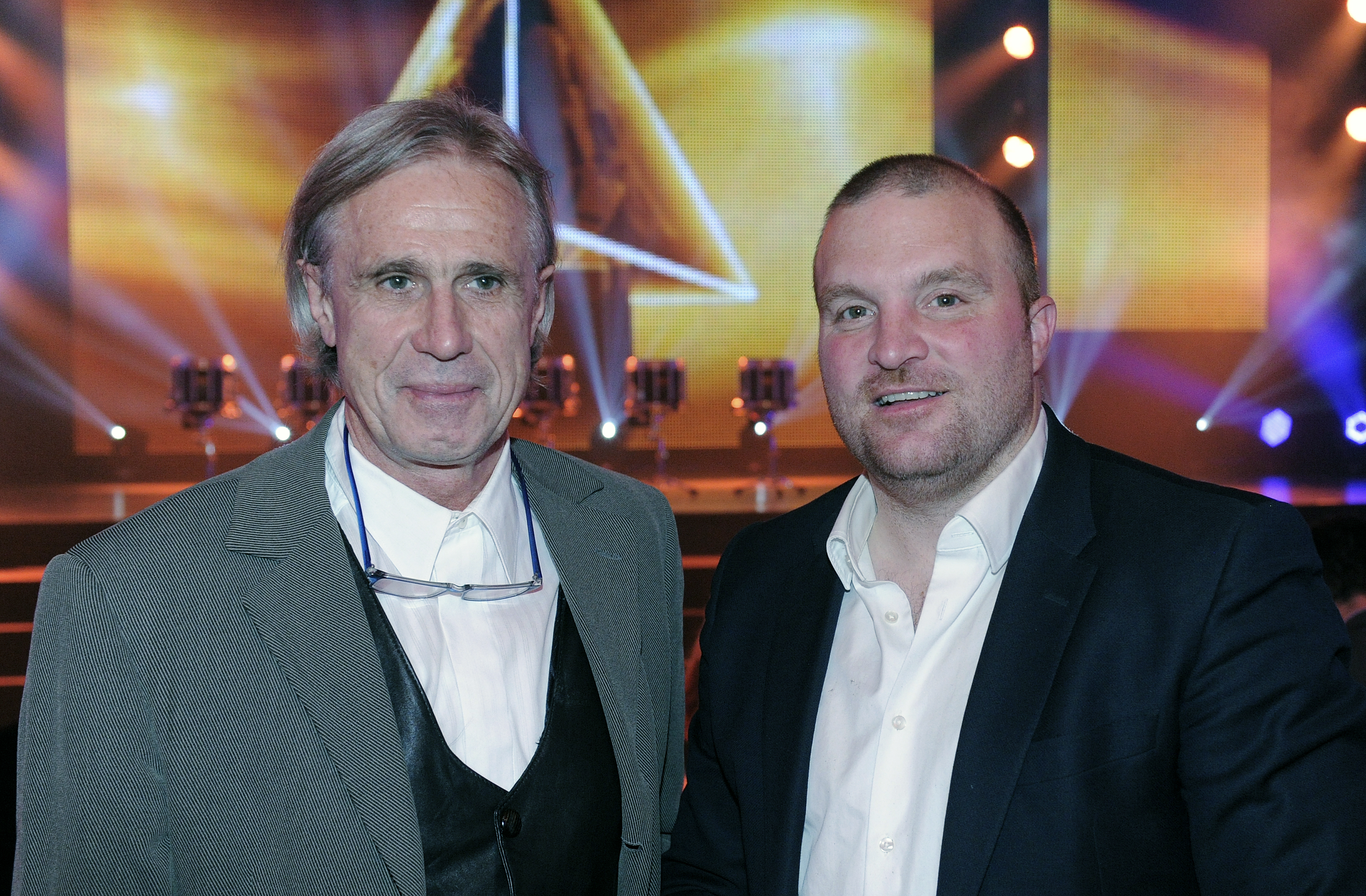 Davos, 20.11.2015. Sport, 13. Internationale Sportnacht Davos 2015. Marc Gianola uebernimmt per 1. Januar 2016 das OK-Praesidium des Davoser Spengler-Cups. Der ehemalige Internationale folgt auf Fredi Pargaetzi (li), der nach 26 Jahren zuruecktreten wird. Copyright by: foto-net / Kurt Schorrer